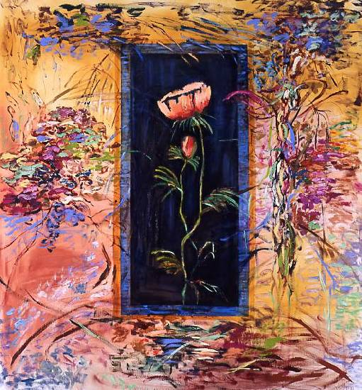 Danièle Rochon, La rosée bleue, 2002, huile sur toile, 190 cm x 170 cm. Collection de l'artiste